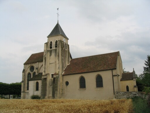 Église de Bussy-Saint-Martin (77)